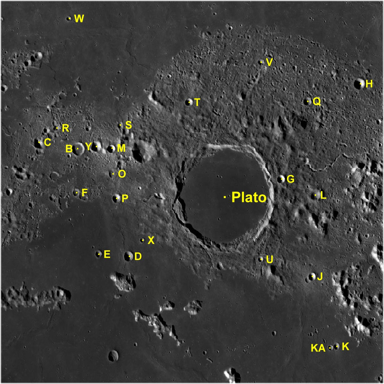 Cráter lunar Plato. Cráteres satélite. (Imagen LRO)